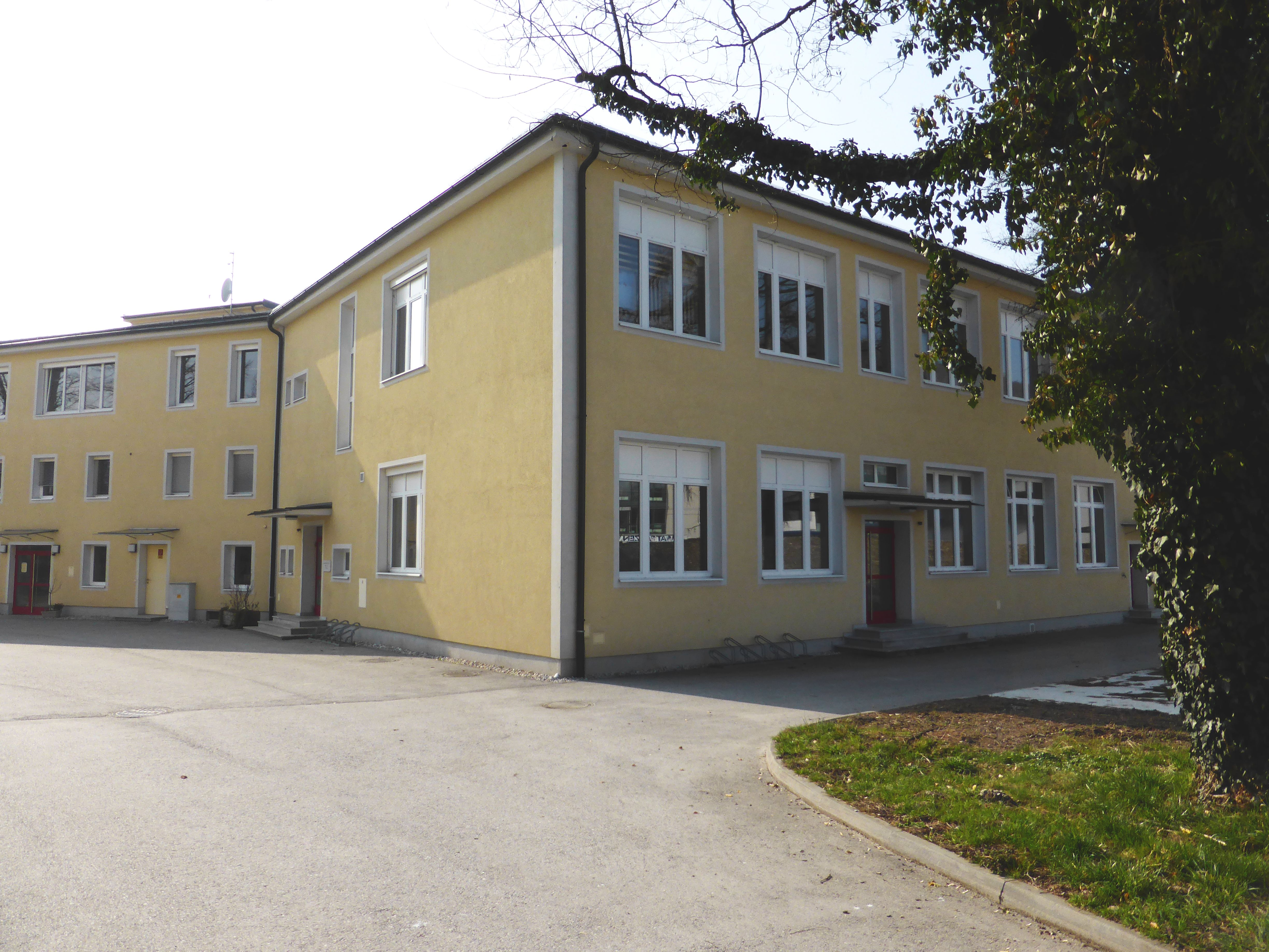 Kloster St. Josef (Salzburg): Kindergarten